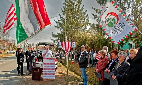 Kaposmérő rovástábla avatás